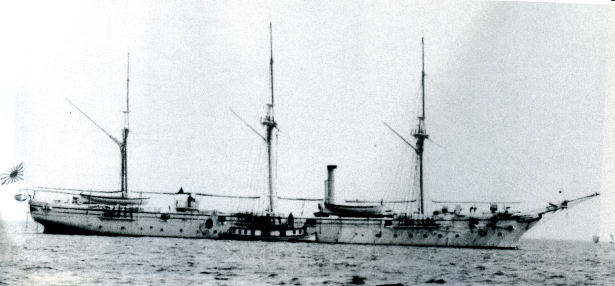 Japanese sloop-of-war Amagi